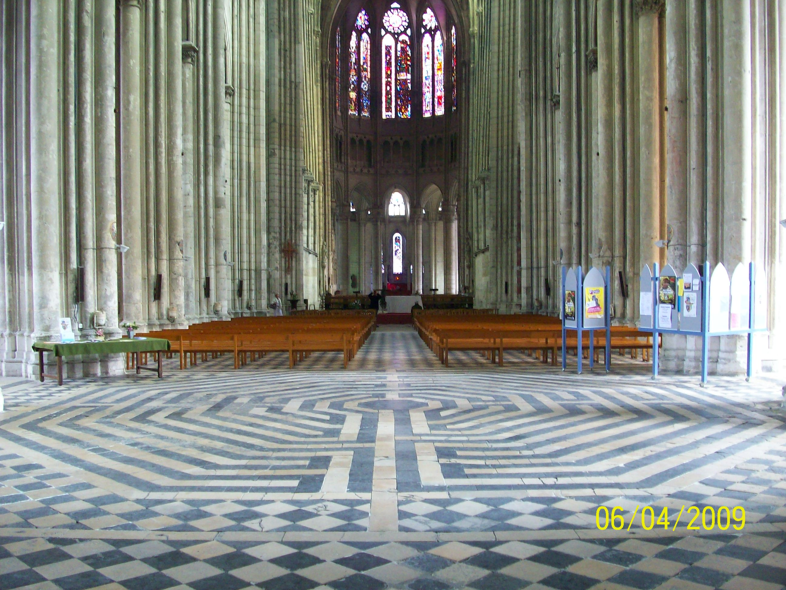 C'est le labyrinthe de la Basilique de Saint-Quentin 02100 en France.